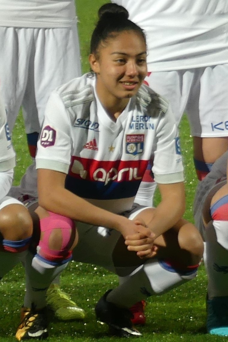 Selma Bacha avec l'Olympique lyonnais en 2018